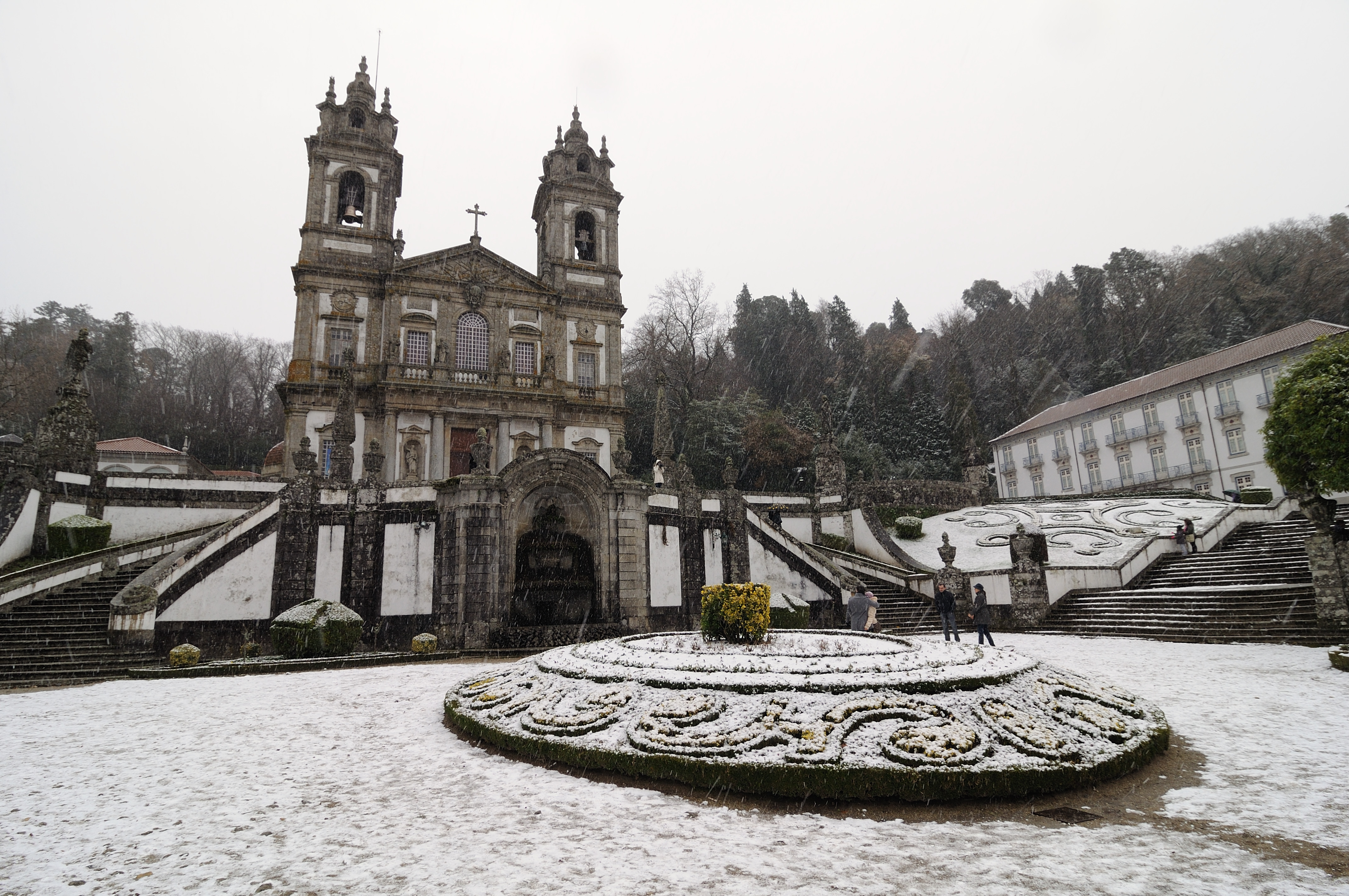 Bom Jesus, Portugal [2010]